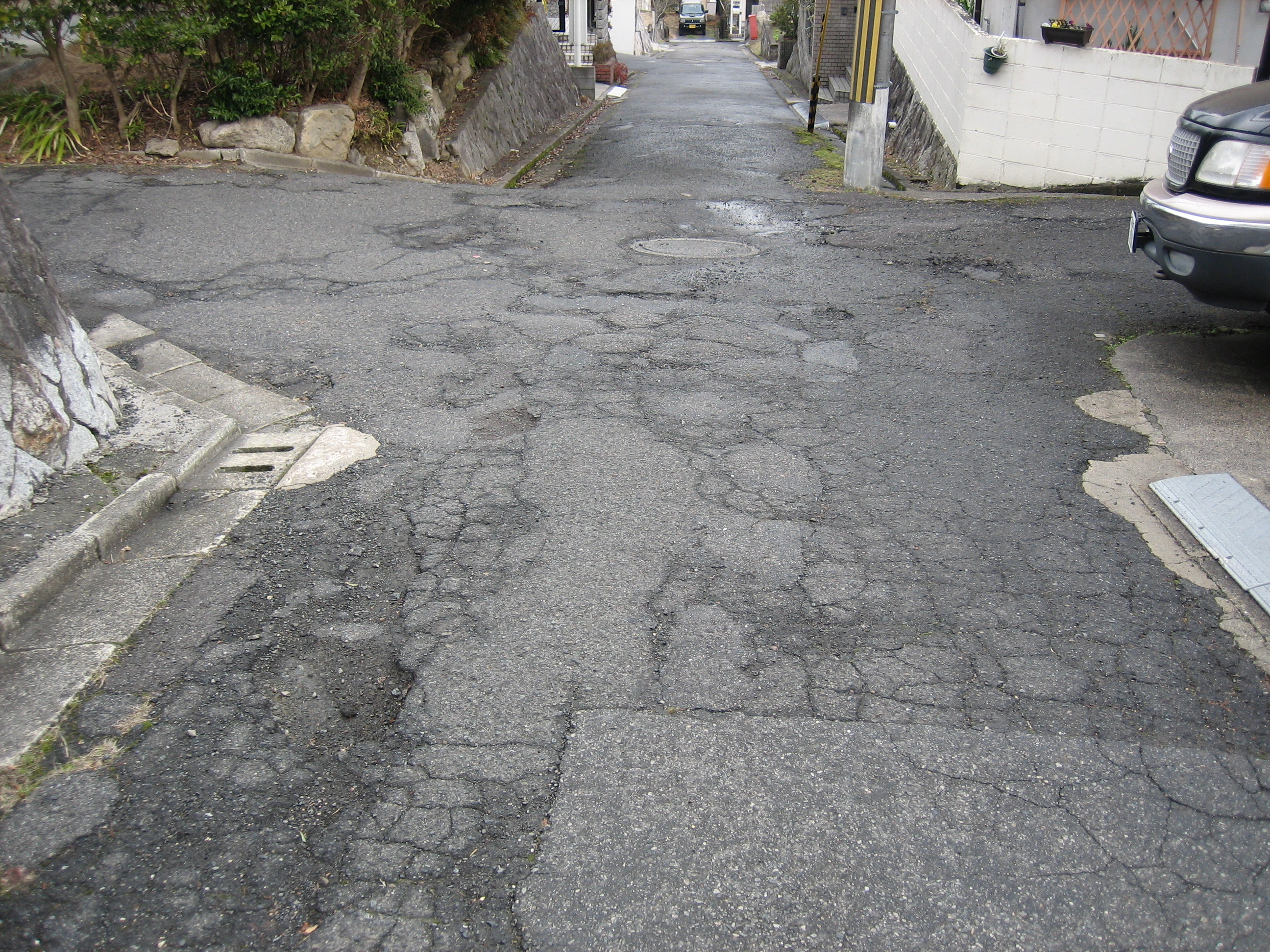 滋賀県大津市和邇北浜から住吉台地区内を撮影